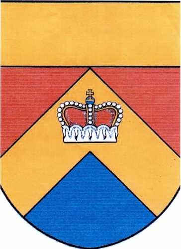 znak, Krásné , okres Žďár nad Sázavou